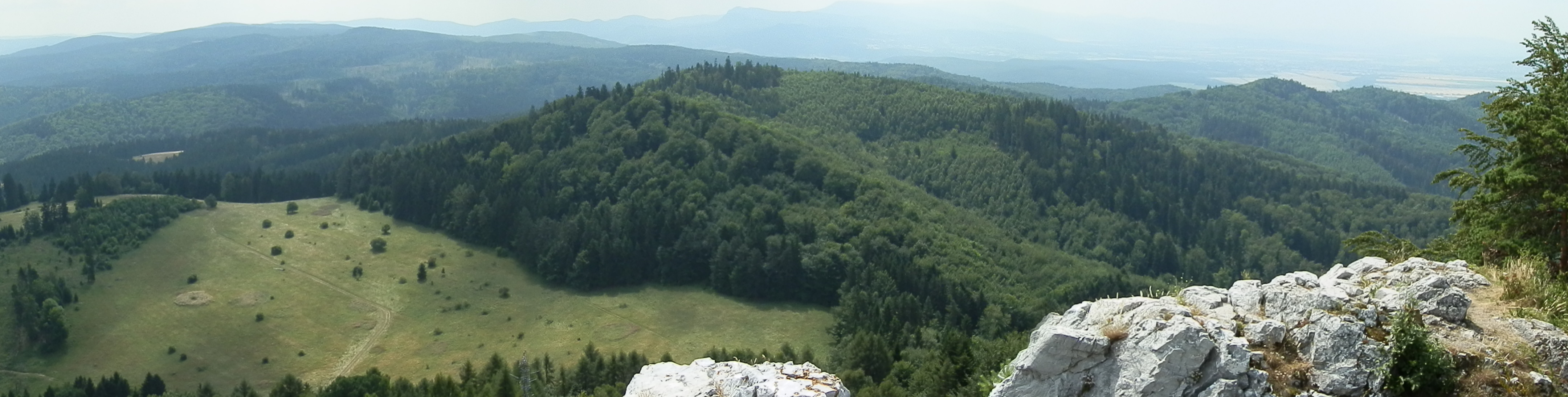 Panoráma z Vyšehradu